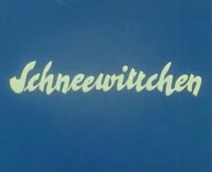 Schriftzug aus dem Vorspann des Films Schneewittchen (1955) aus dem Jahr 1955